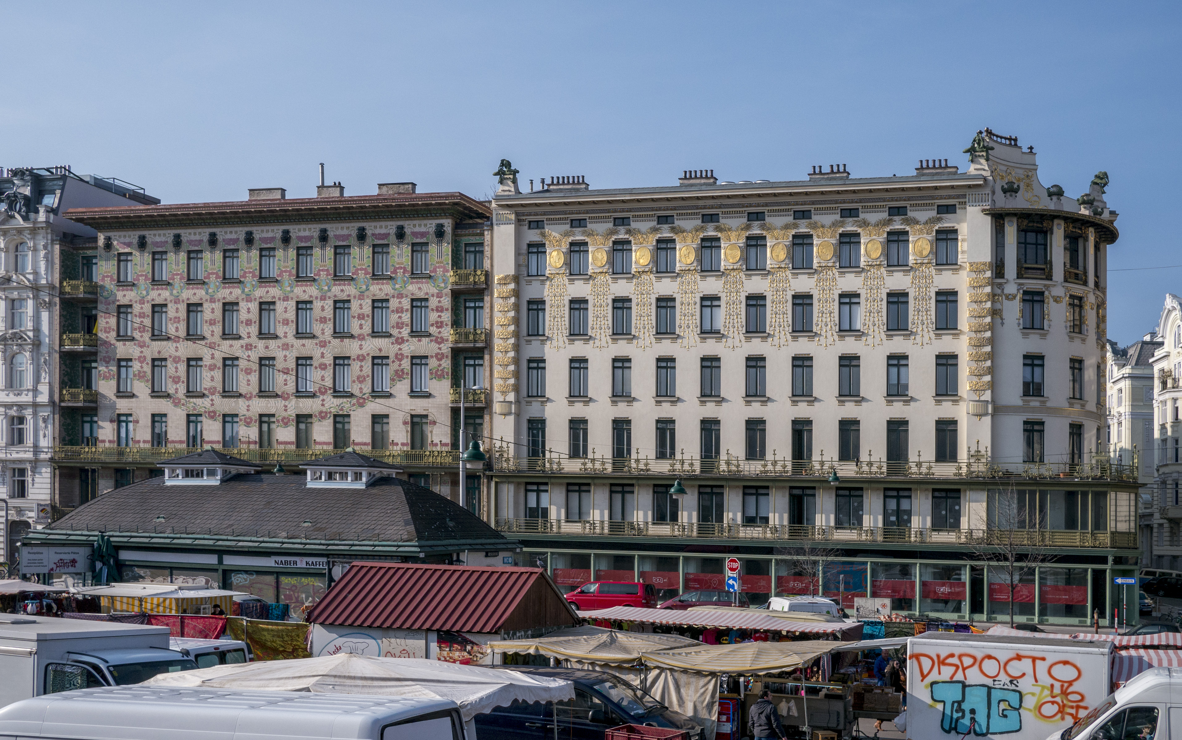 Wienzeilenhäuser